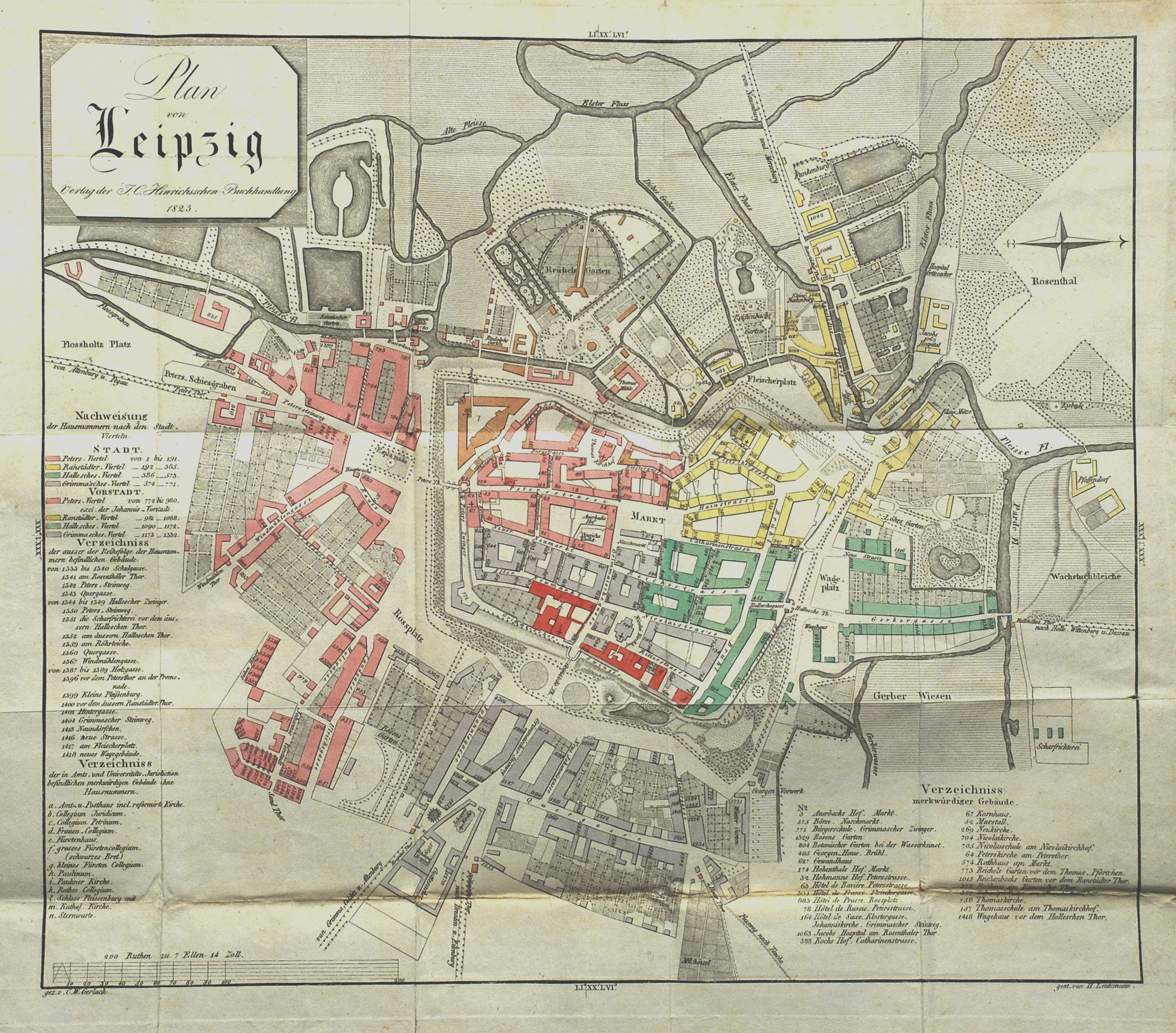 Leipzig 1823. Gefalteter Stadtplan in [Anonymus]: Gemälde von Leipzig und seiner Umgebung. Leipzig: J. C. Hinrichs 1823. Aquarellierter Kupferstich 35 x 41,5 cm Plattenrand.